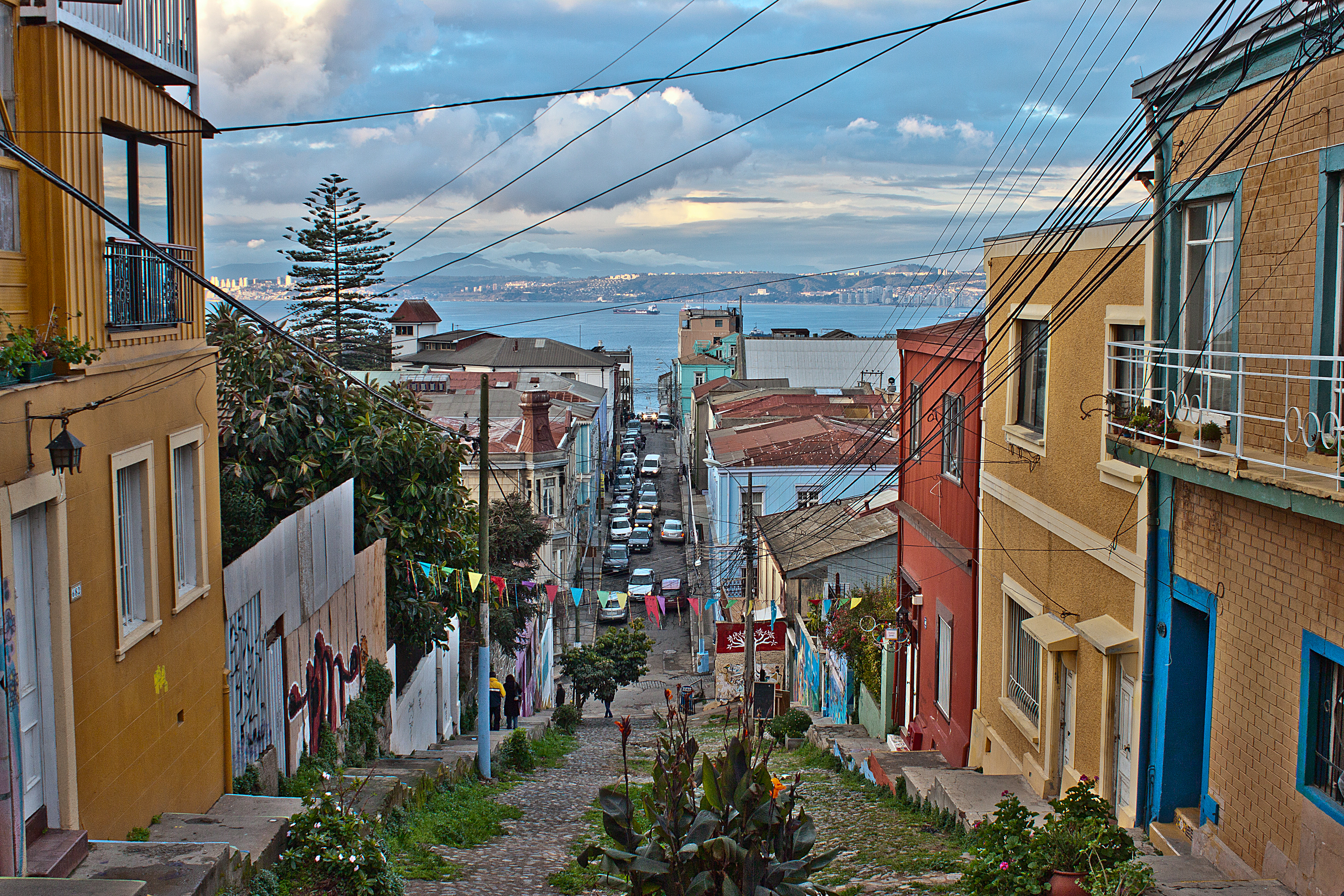 Calle Templeman, Cerro Alegre, Valparaíso This is a photo of a national monument in Chile: 606